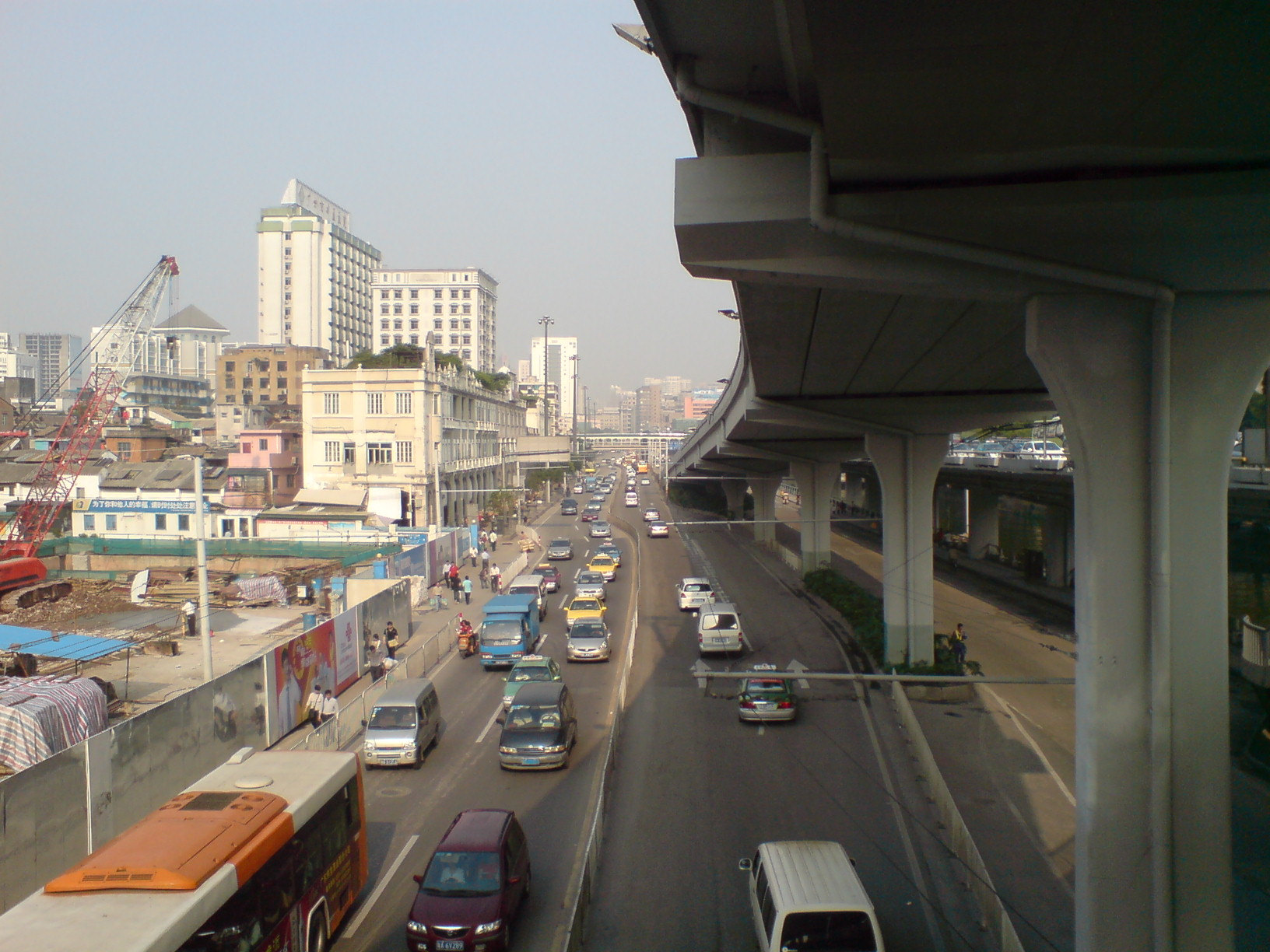 中文（中国大陆）: 广州六二三路